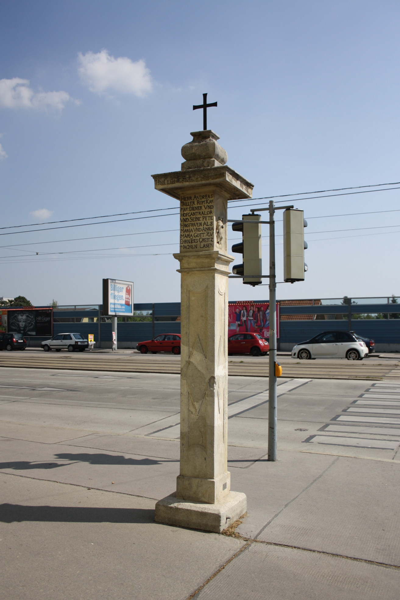 Das Trillerkreuz an der Ecke Trillergasse / Brünnerstraße (97-99) im Wiener Gemeindebezirk Floridsdorf.